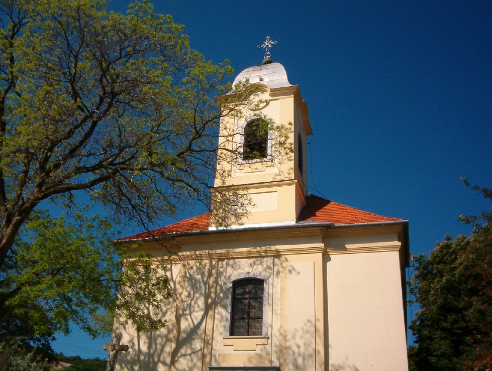 A csolnoki Nepomuki Szent János templom (Komárom-Esztergom megye)